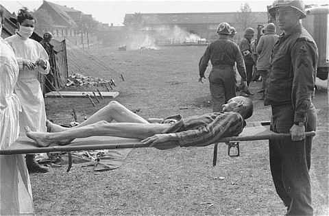 American medical personnel evacuate Langenstein survivors to a hospital.